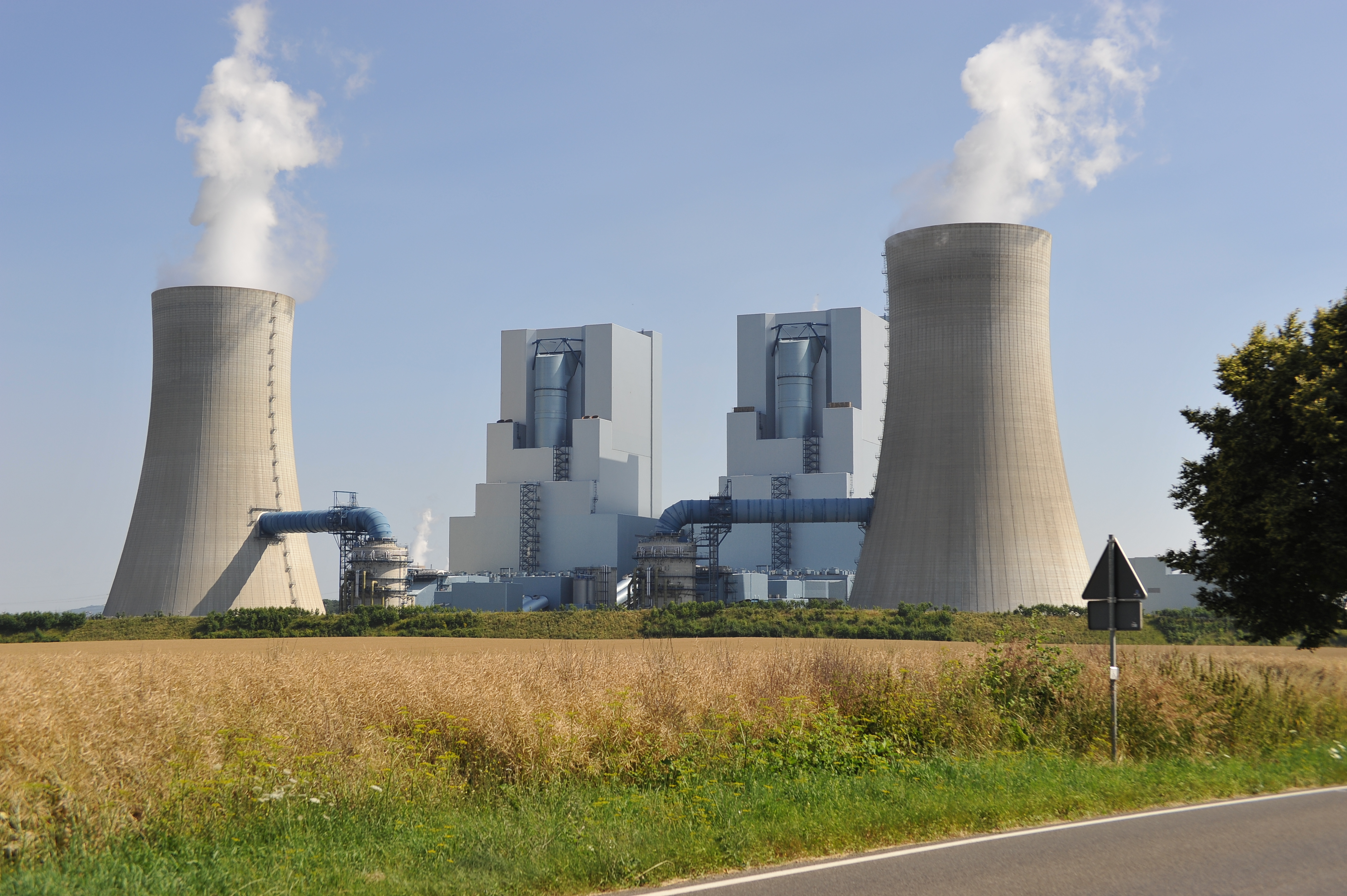 Kraftwerk Neurath Block F und G, Hinteransicht